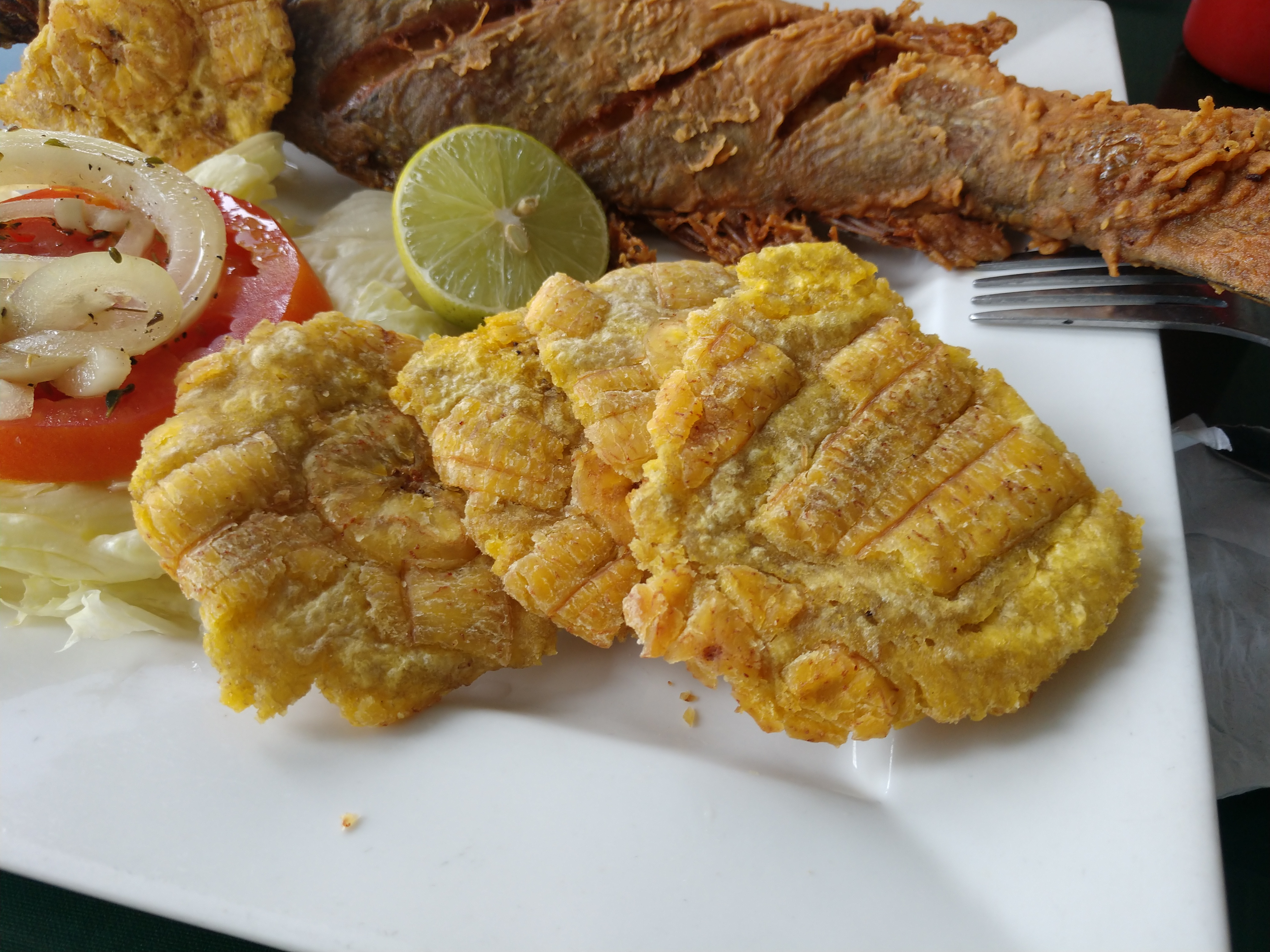 Detalle de patacones (plàtano verde frito).